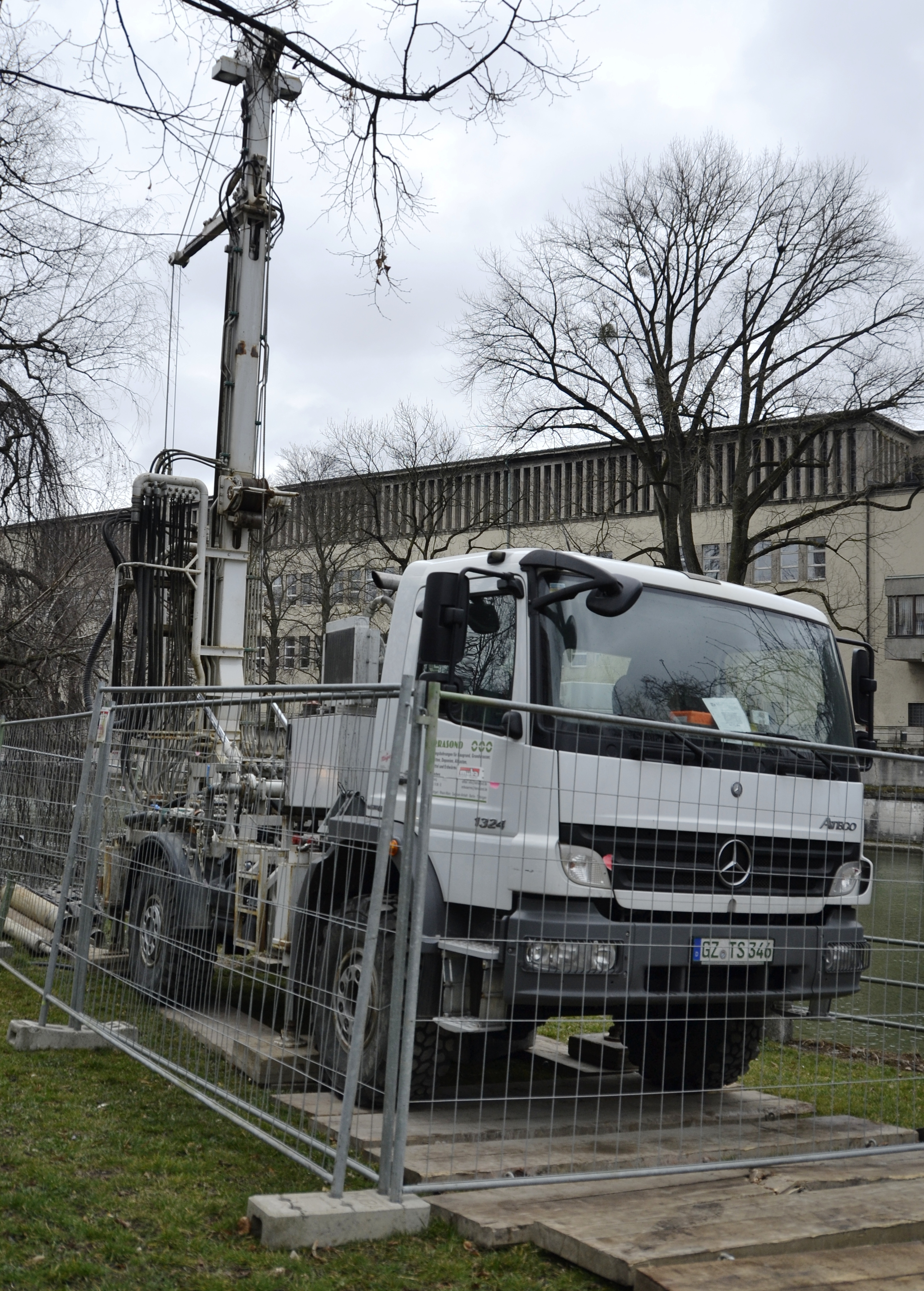 Bohranlage auf Basis eines Mercedes Benz Atego.